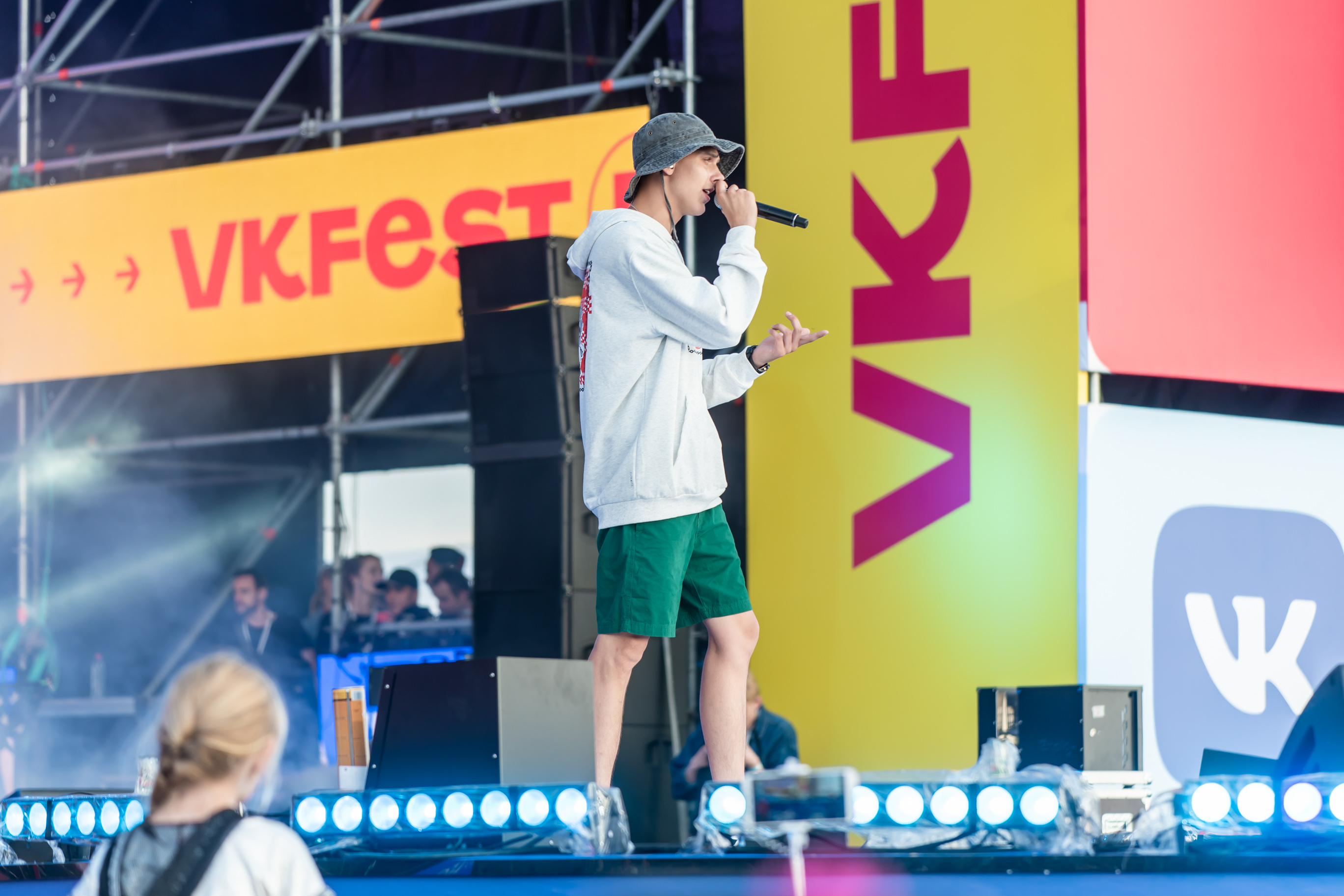 Тима Белорусских на VK Fest 5